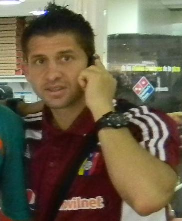 César Eduardo González Amais